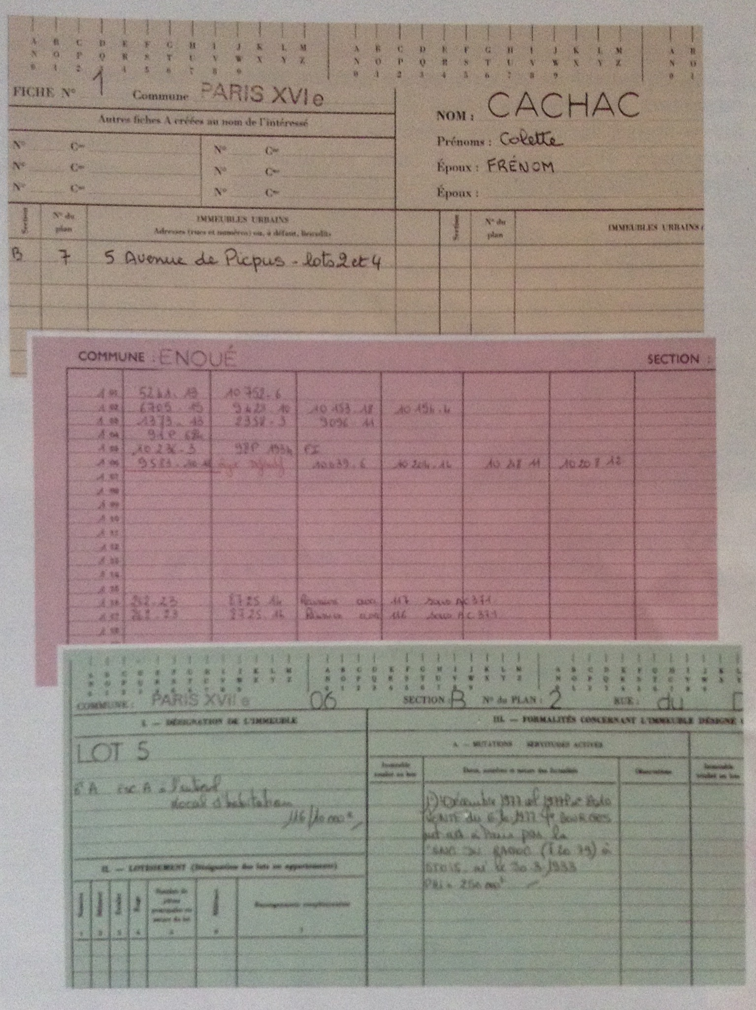 Fichier Immobilier (décret de 1955) Exemples des différentes fiches